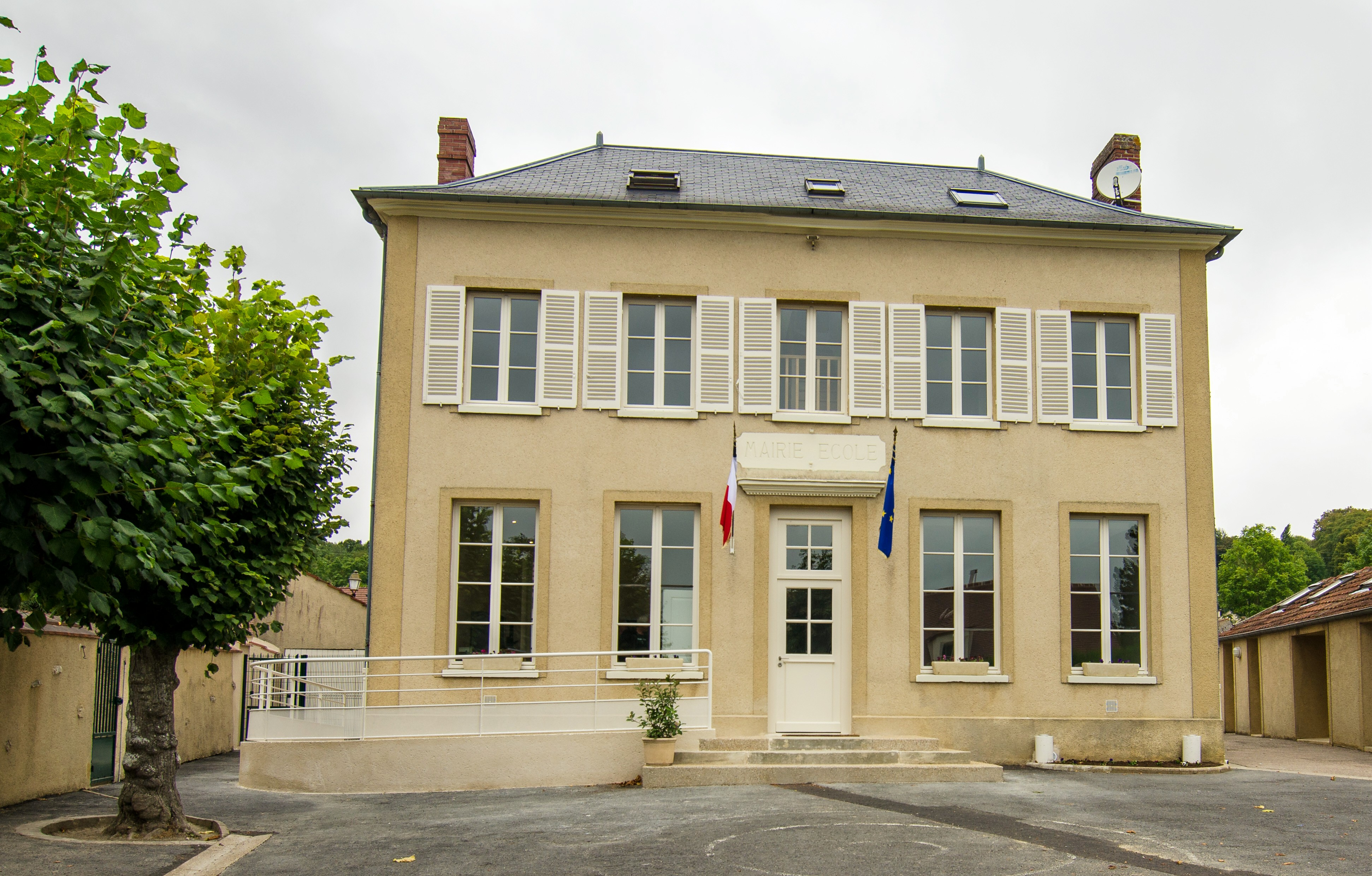 Mairie-école de Villers en Arthies (Val d'Oise)